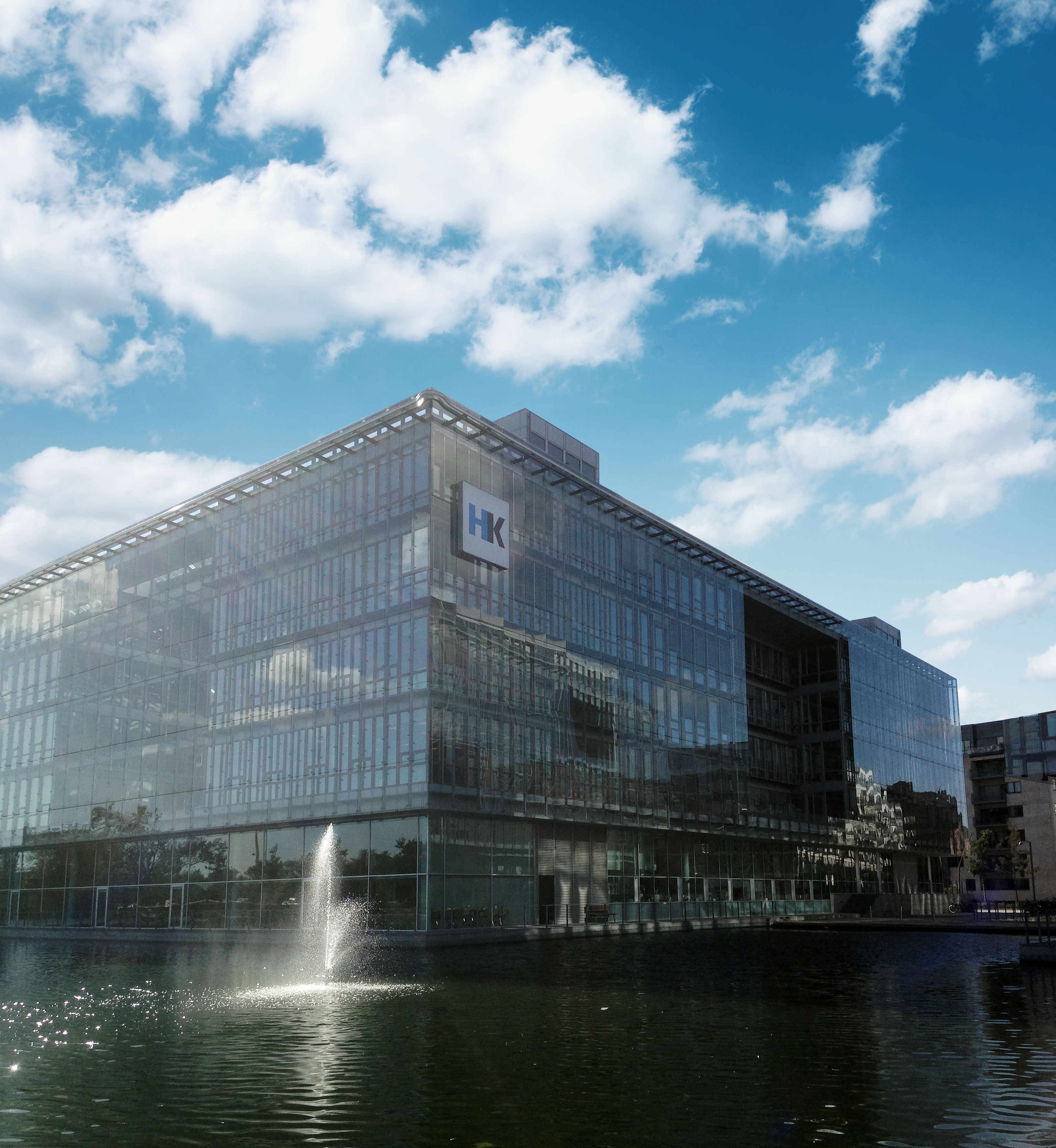 HK Danmarks hovedkontor på Weidekampsgade i København